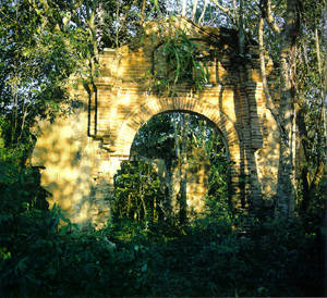 ruinas